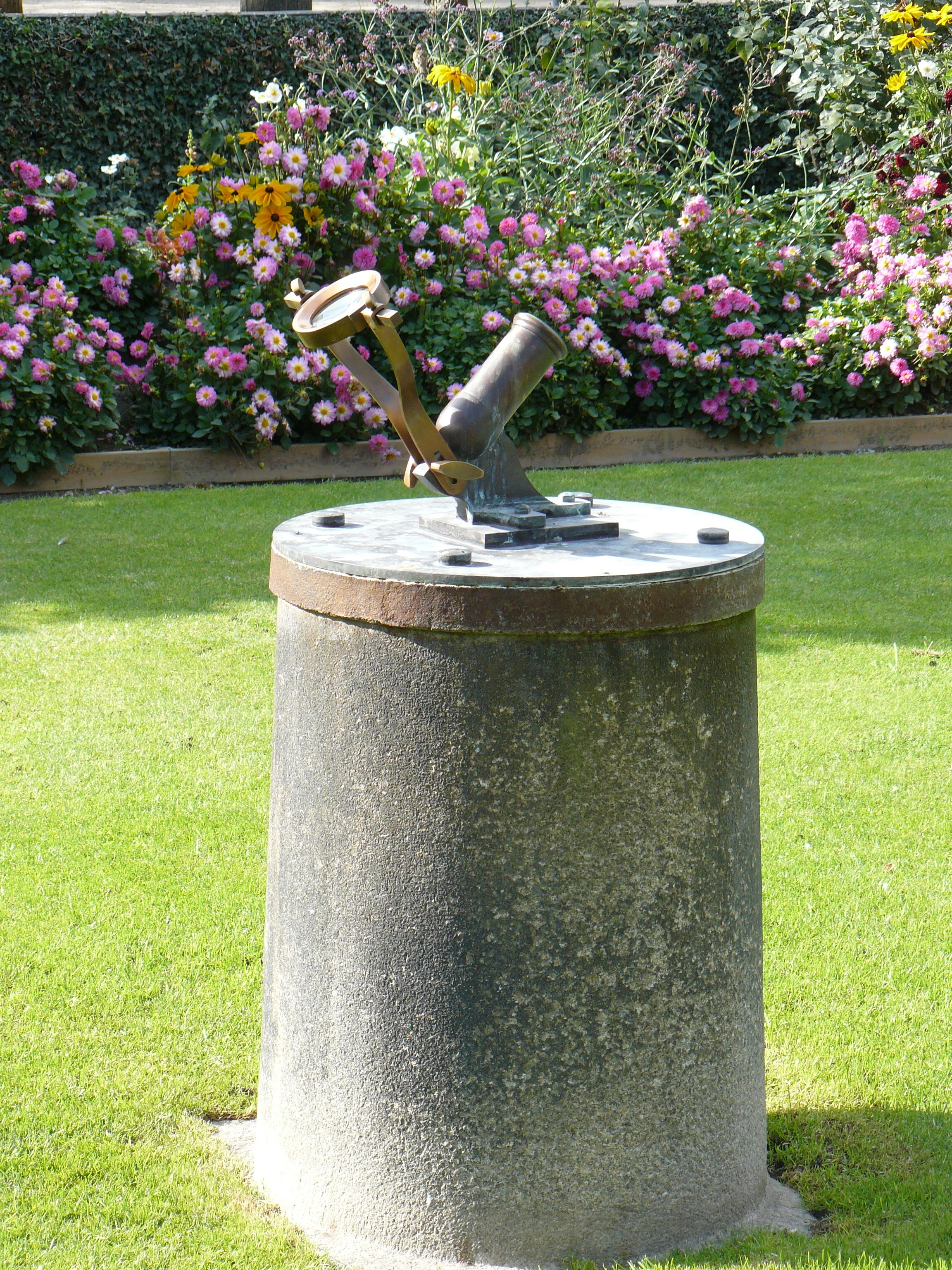 Petit canon dans le jardin du Palais-Royal à Paris. Installé en 1786, il tirait chaque jour à midi grâce au soleil. Volé en 1986, c'est une réplique.